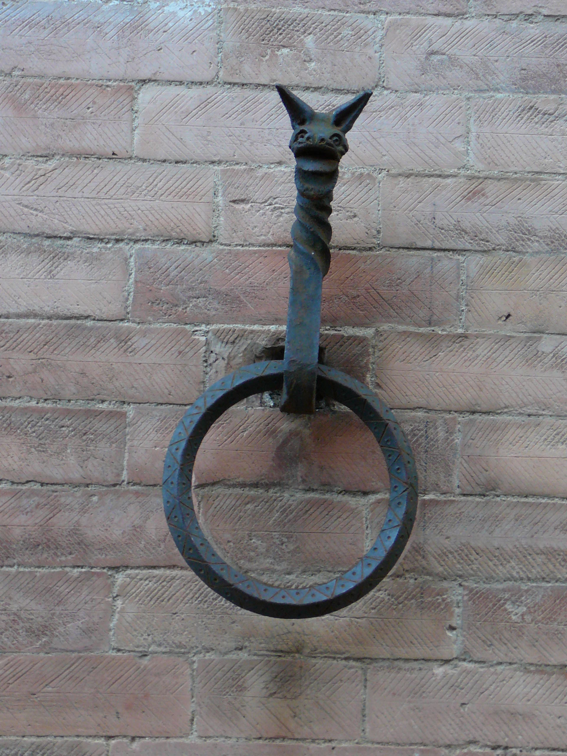 Particolare in ferro battuto Castello di Farnetella (Siena)